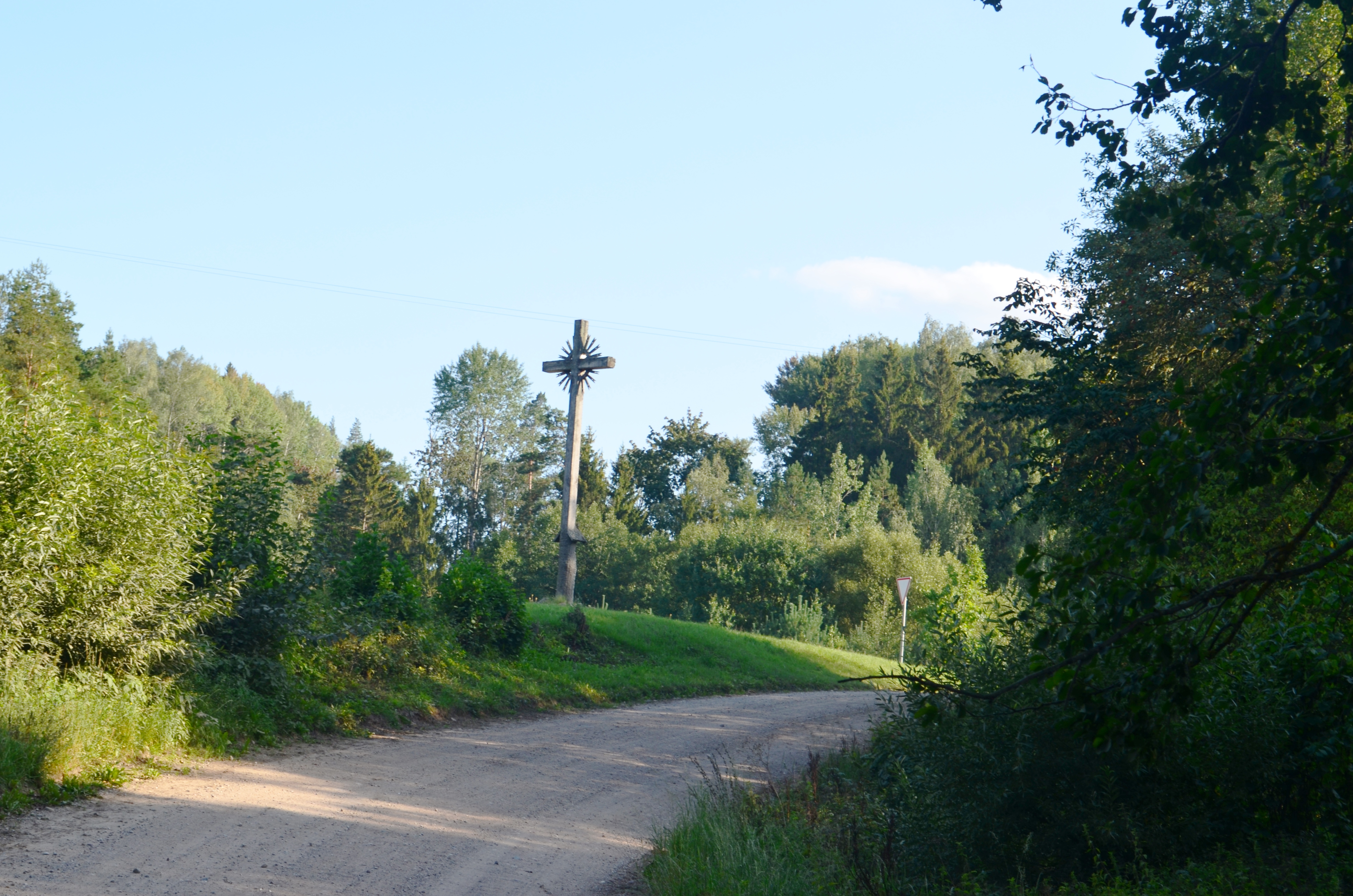 Kryžius, Kozelkiškės, Trakų raj.